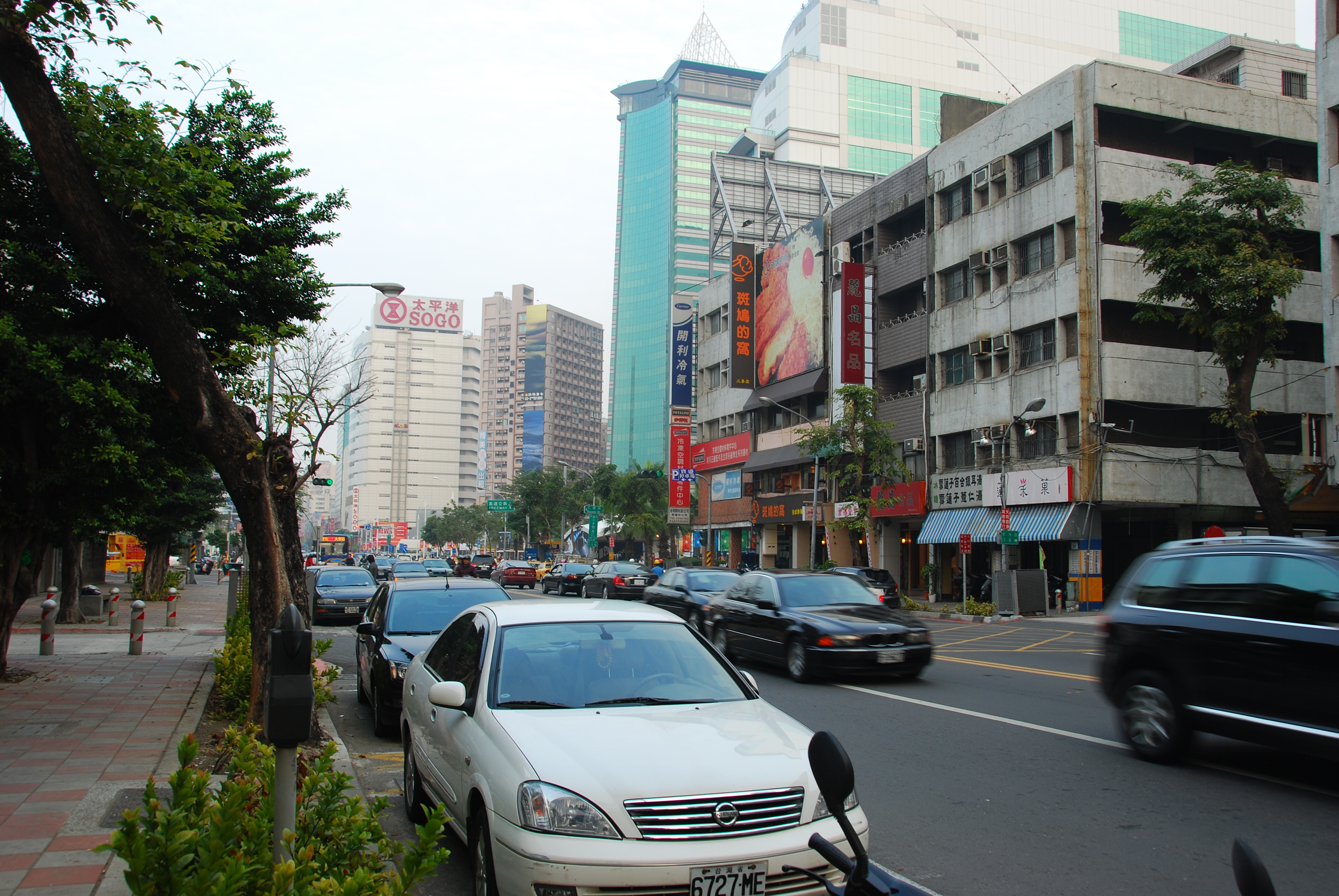 高雄市苓雅區三多四路（大遠百及三多商圈站附近）